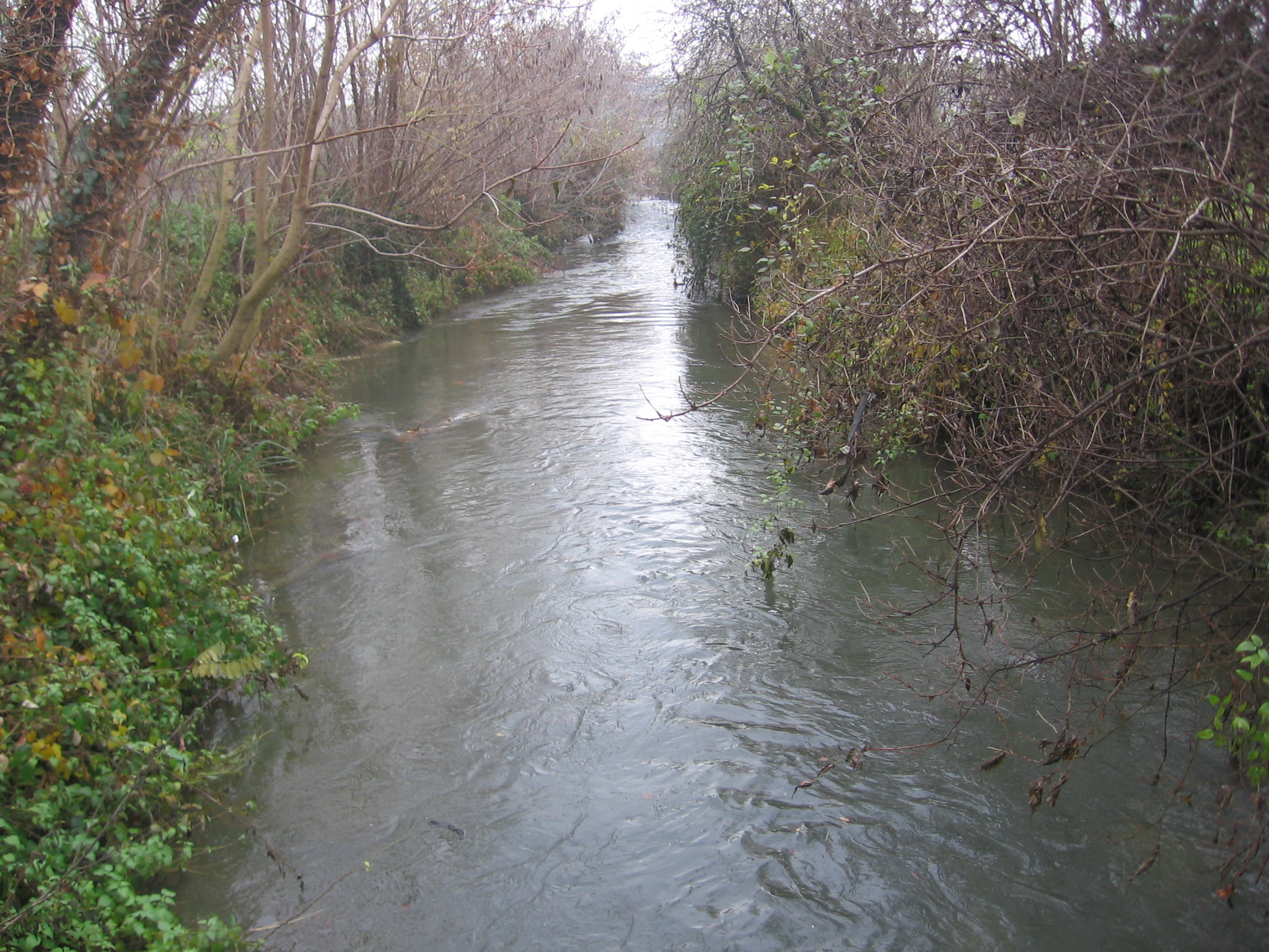 torrente Morla, pianura bergamasca, Italy